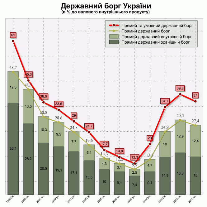 Державний борг України у відсотках до ВВП країни.